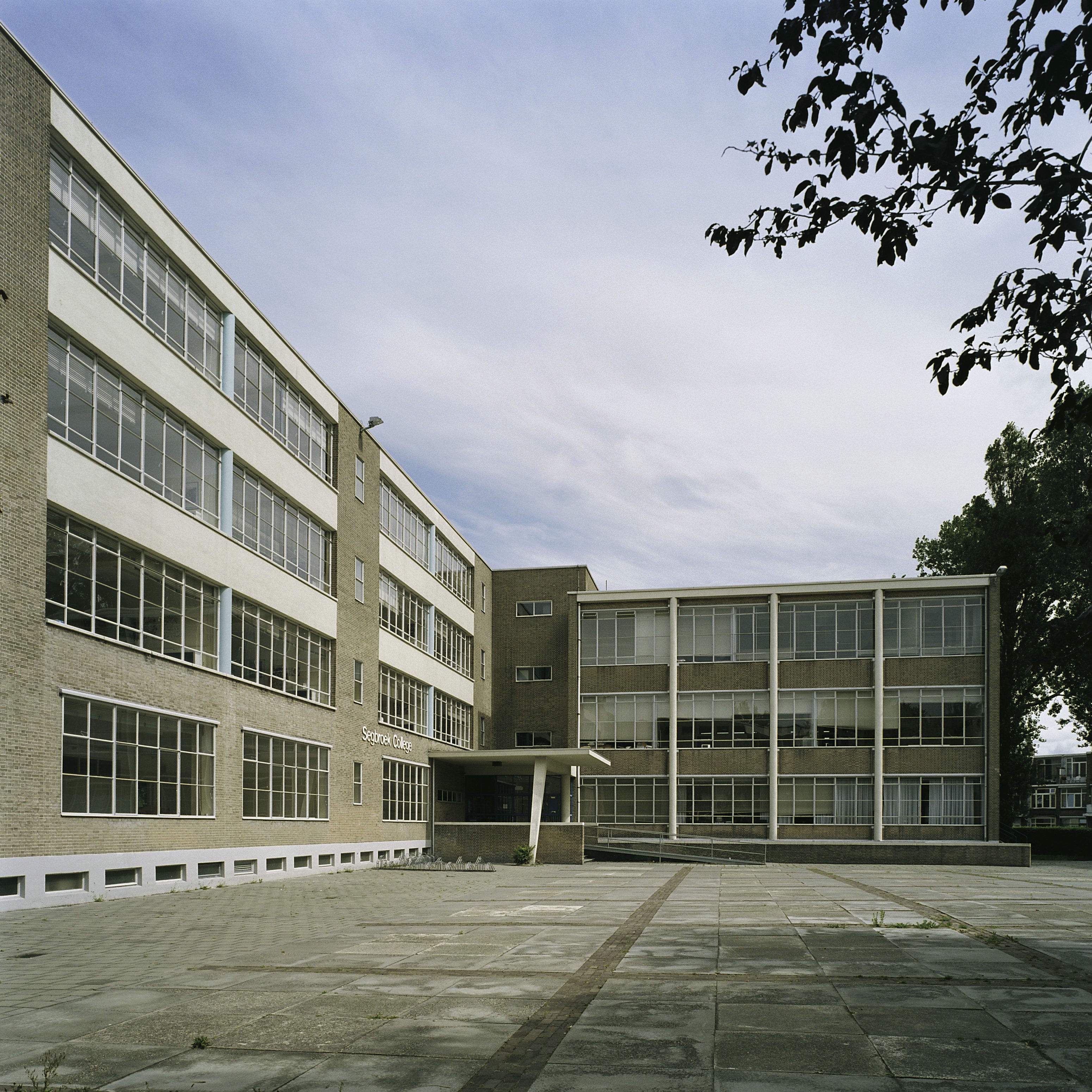 Tweede Vrijzinnig Christelijk Lyceum: Overzicht van de voorgevel (opmerking: Gefotografeerd voor Monumenten van Herrezen Nederland)